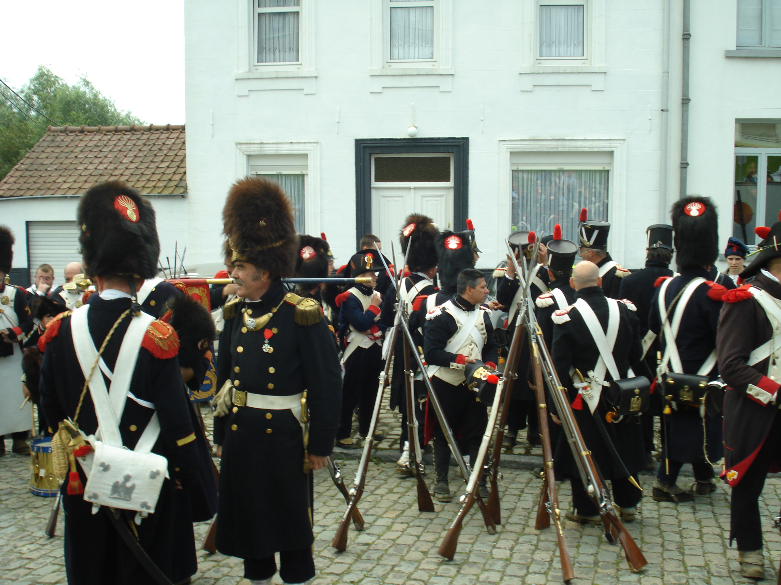 Waterloo - Juin 2012